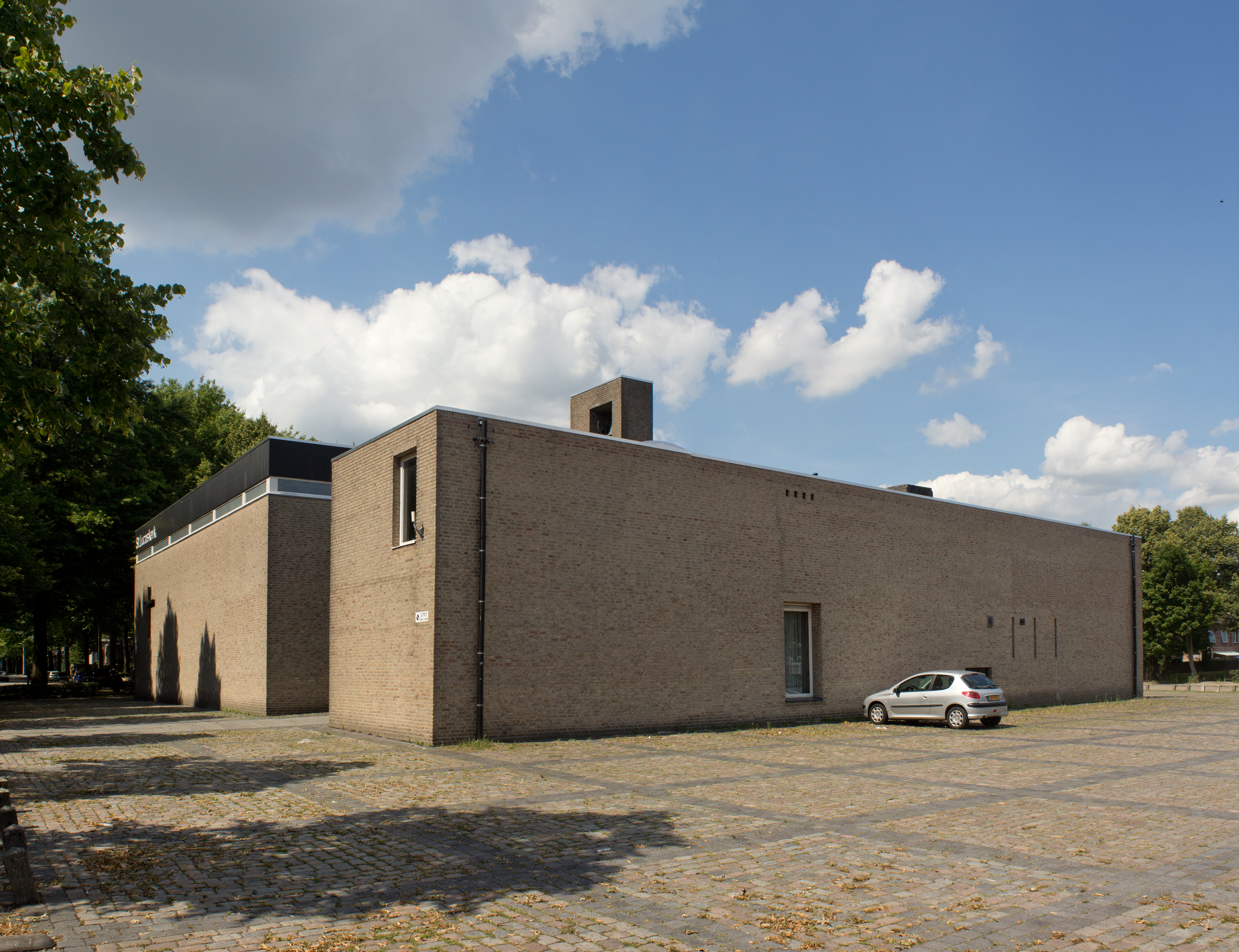 De Lucaskerk te Tilburg (het Zand). Gezien vanaf de Montfortanenlaan